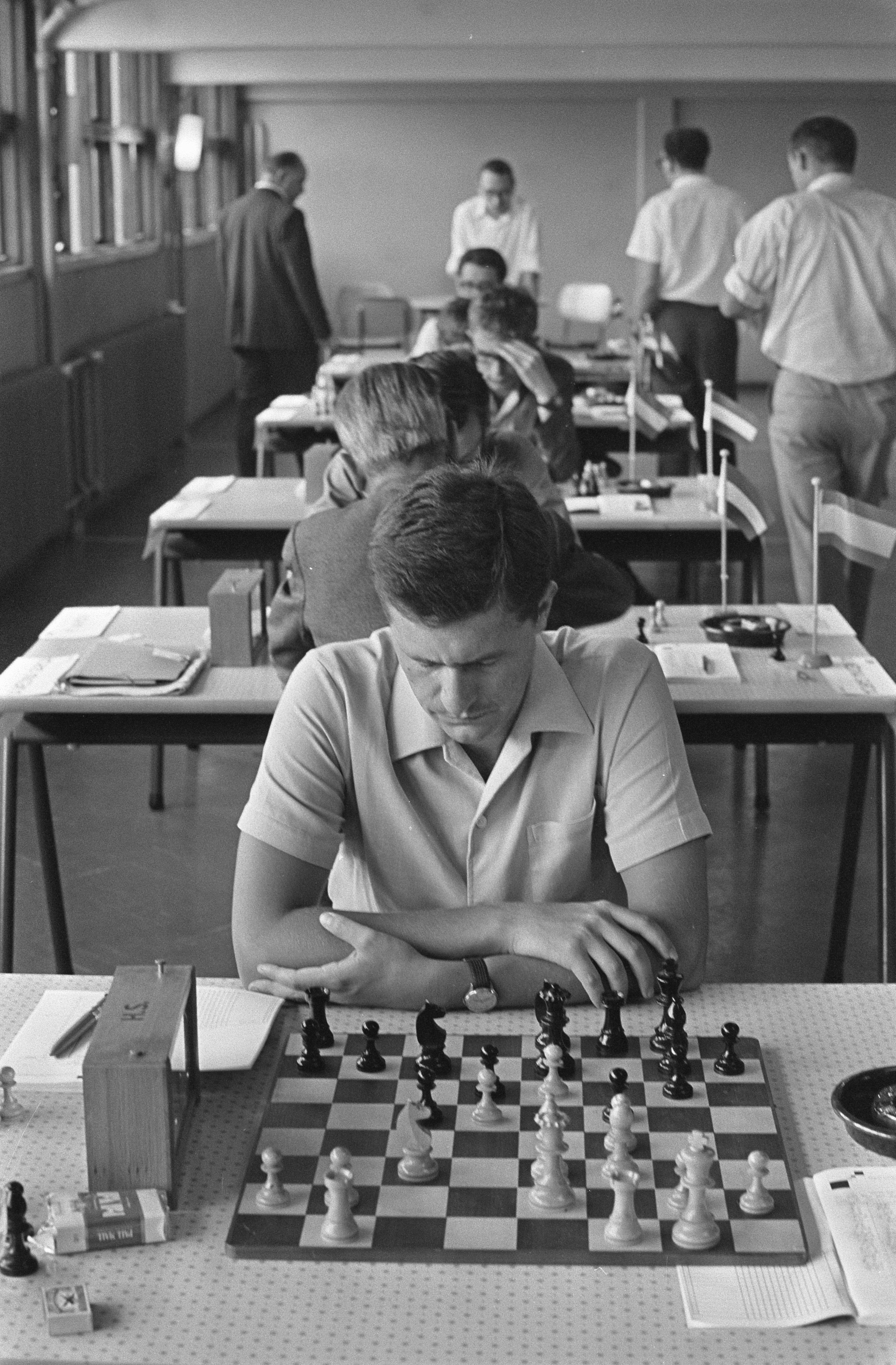 Collectie / Archief : Fotocollectie Anefo Reportage / Serie : [ onbekend ] Beschrijving : IBM Schaaktoernooi 1967 . Nnummer 19 Drazen Marovic (Joegoslavie),/ Datum : 18 juli 1967 Locatie : Joegoslavië, Zwitserland Trefwoorden : Schaken Persoonsnaam : D. Marovic, E. Gereben Fotograaf : Steinmeier, Hans / Anefo Auteursrechthebbende : Nationaal Archief Materiaalsoort : Negatief (zwart/wit) Nummer archiefinventaris : bekijk toegang 2.24.01.05 Bestanddeelnummer : 920-5139